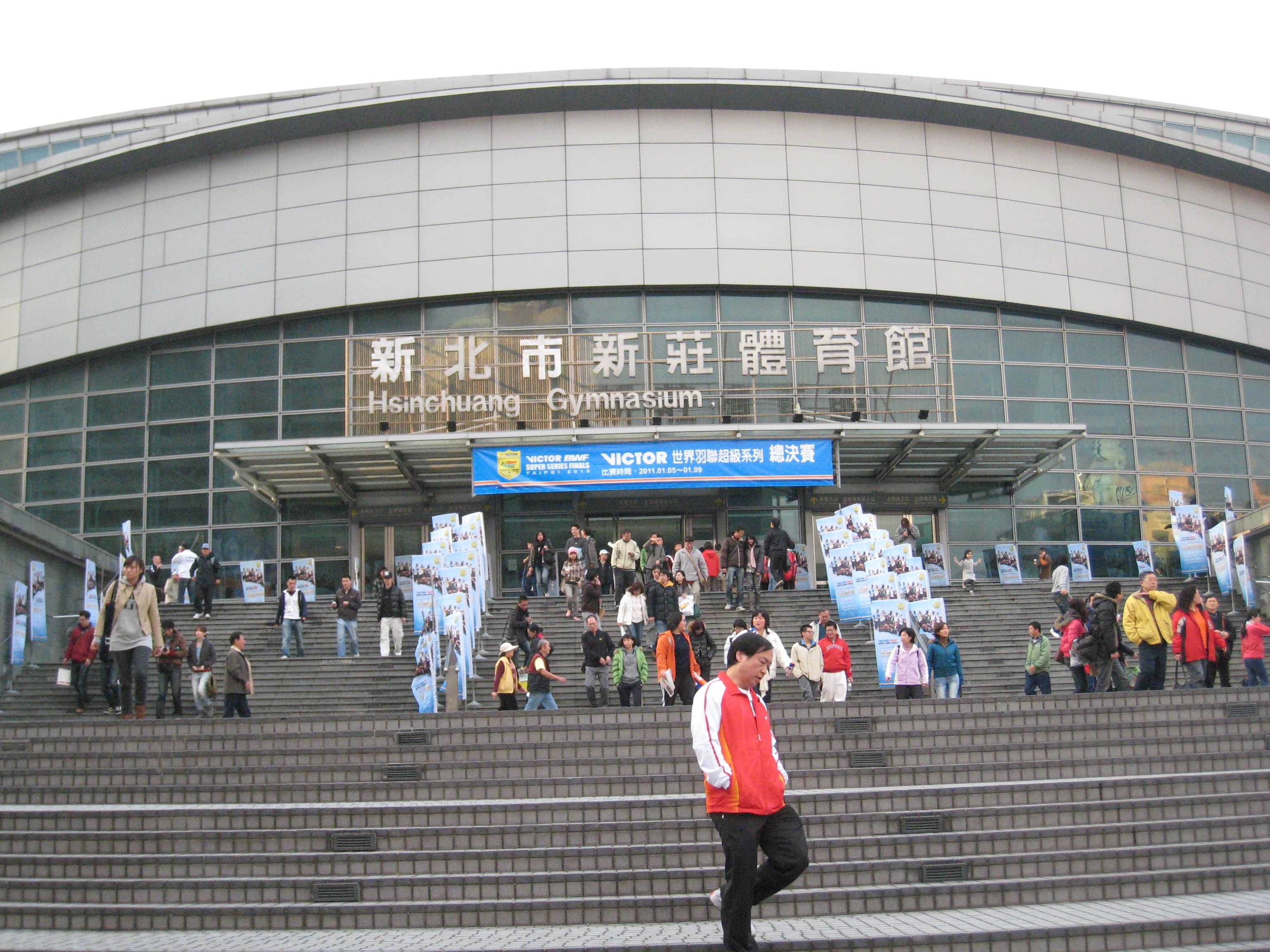 新北市新莊體育館。 Hsinchuang Gymnasium, New Taipei, Taiwan